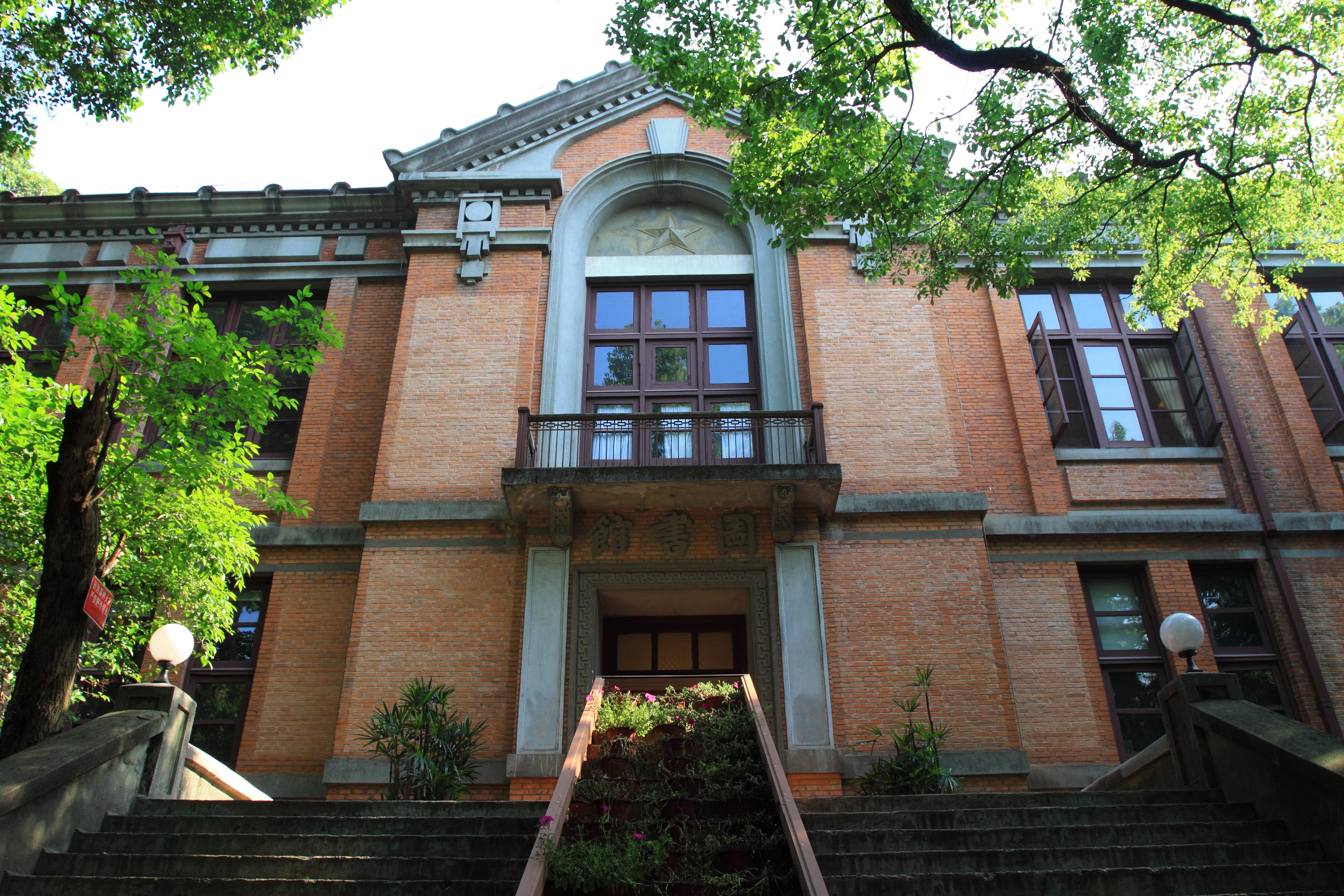 之江大学旧址图书馆，位于中国浙江省杭州市。